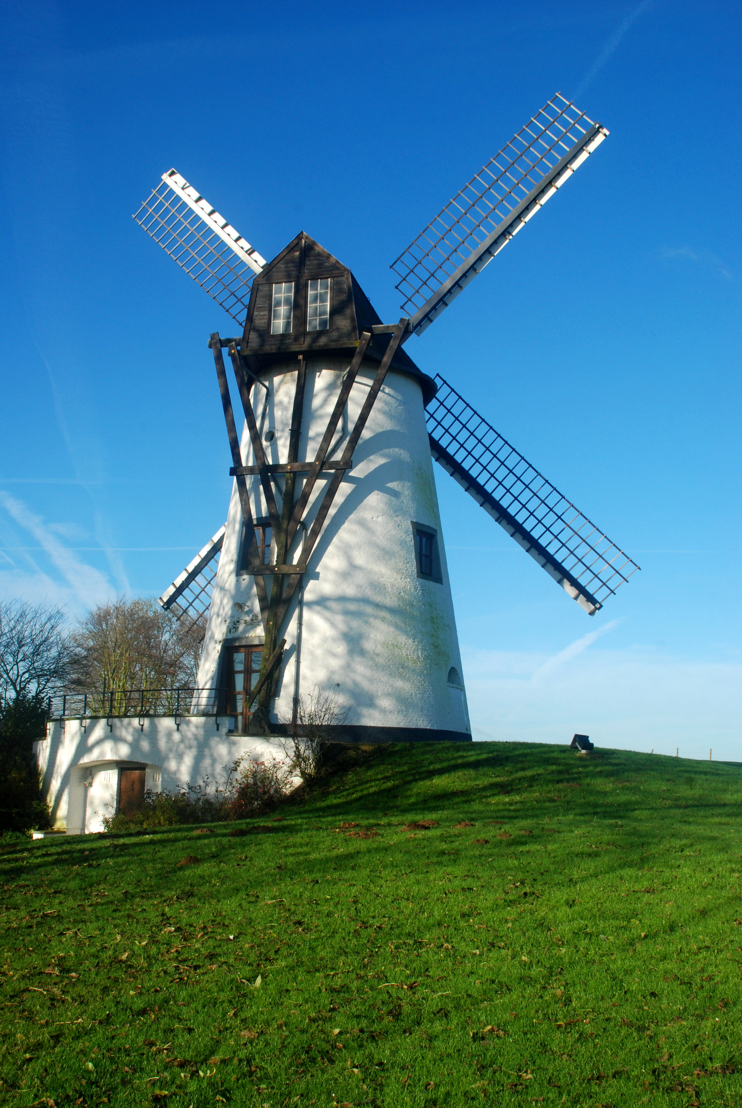 Belgique - Brabant wallon - Incourt - Opprebais - Moulin Gustot